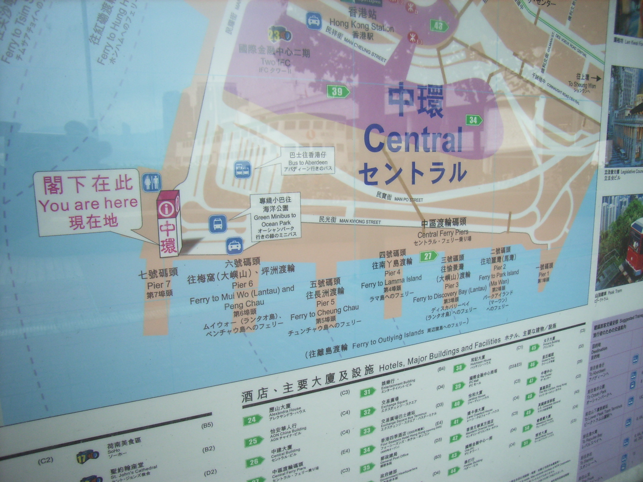 港外線碼頭 又名zh:中環渡輪碼頭, 是中環zh:國際金融中心中心en:IFC以北及維多利亞港以南之間的一片碼頭地帶, 包括由2號碼頭至7號碼頭. 在中環的行人路牌上可以看到它有時稱為zh:離島/新市鎮zh:渡輪zh:碼頭 或者又有時稱為zh:中環渡輪碼頭(2至7號)